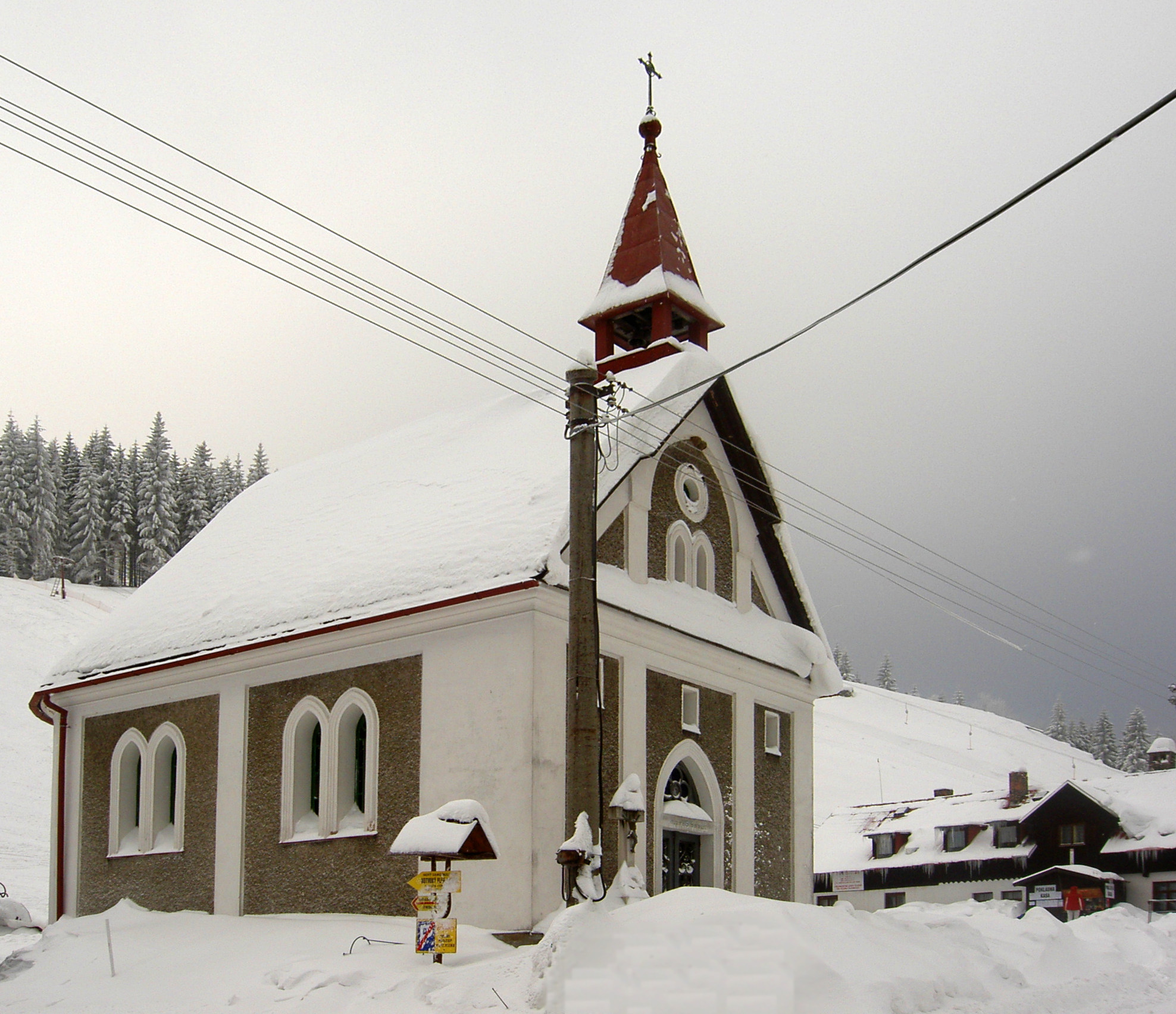 Petříkov, část obce Ostružná